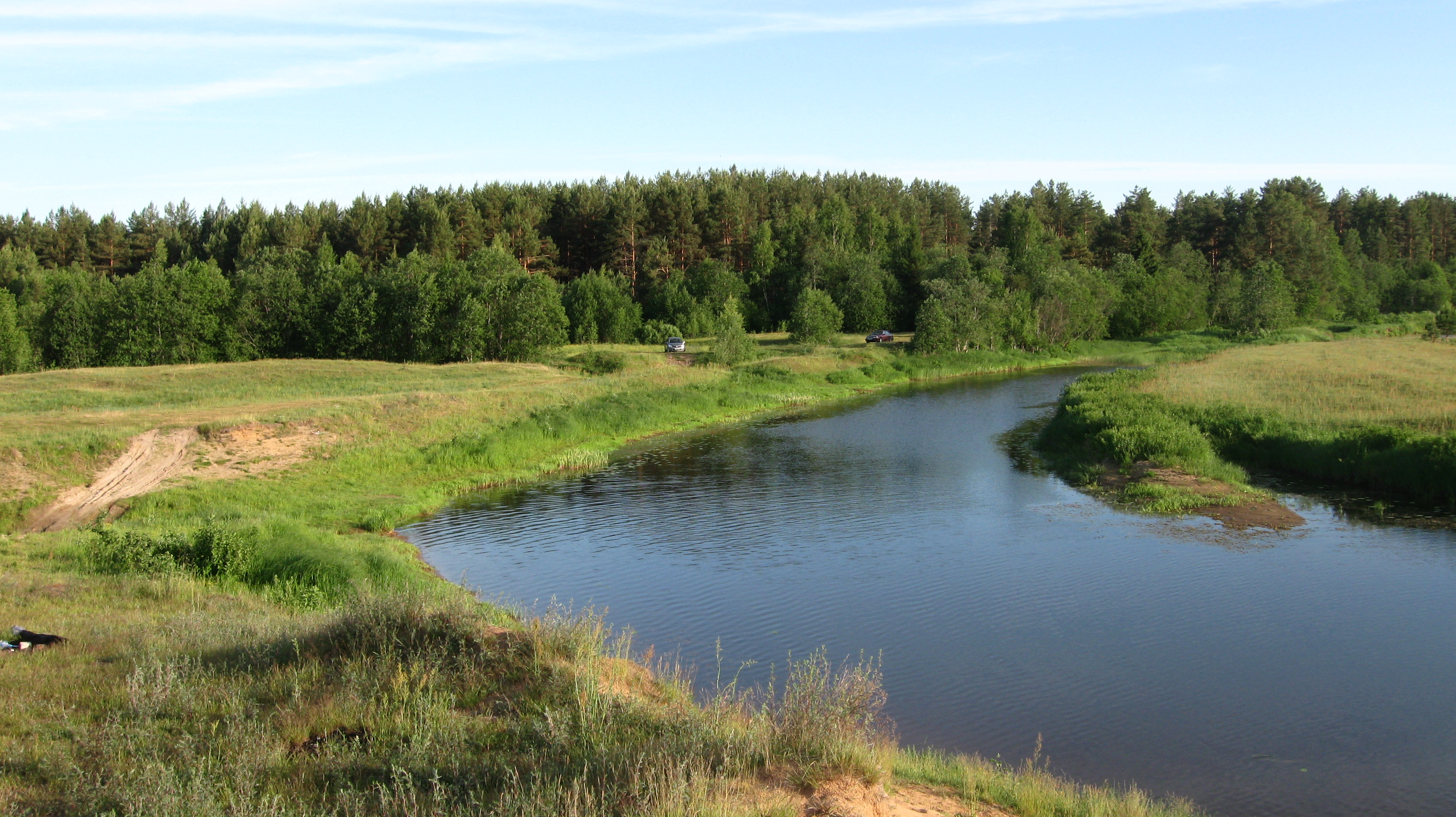 Река Урга в селе Быковка, Воротынский район Нижегородской области